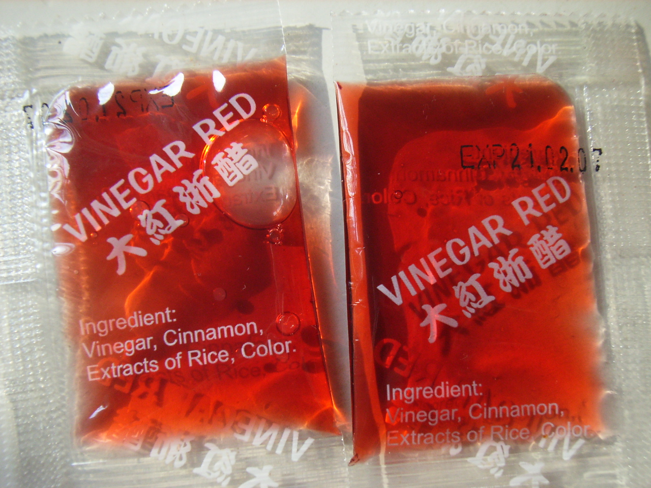 Vinegar Red 紅醋 成份: 醋酸、肉桂....等等